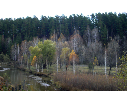 Ленточный бор, снято в Барнауле